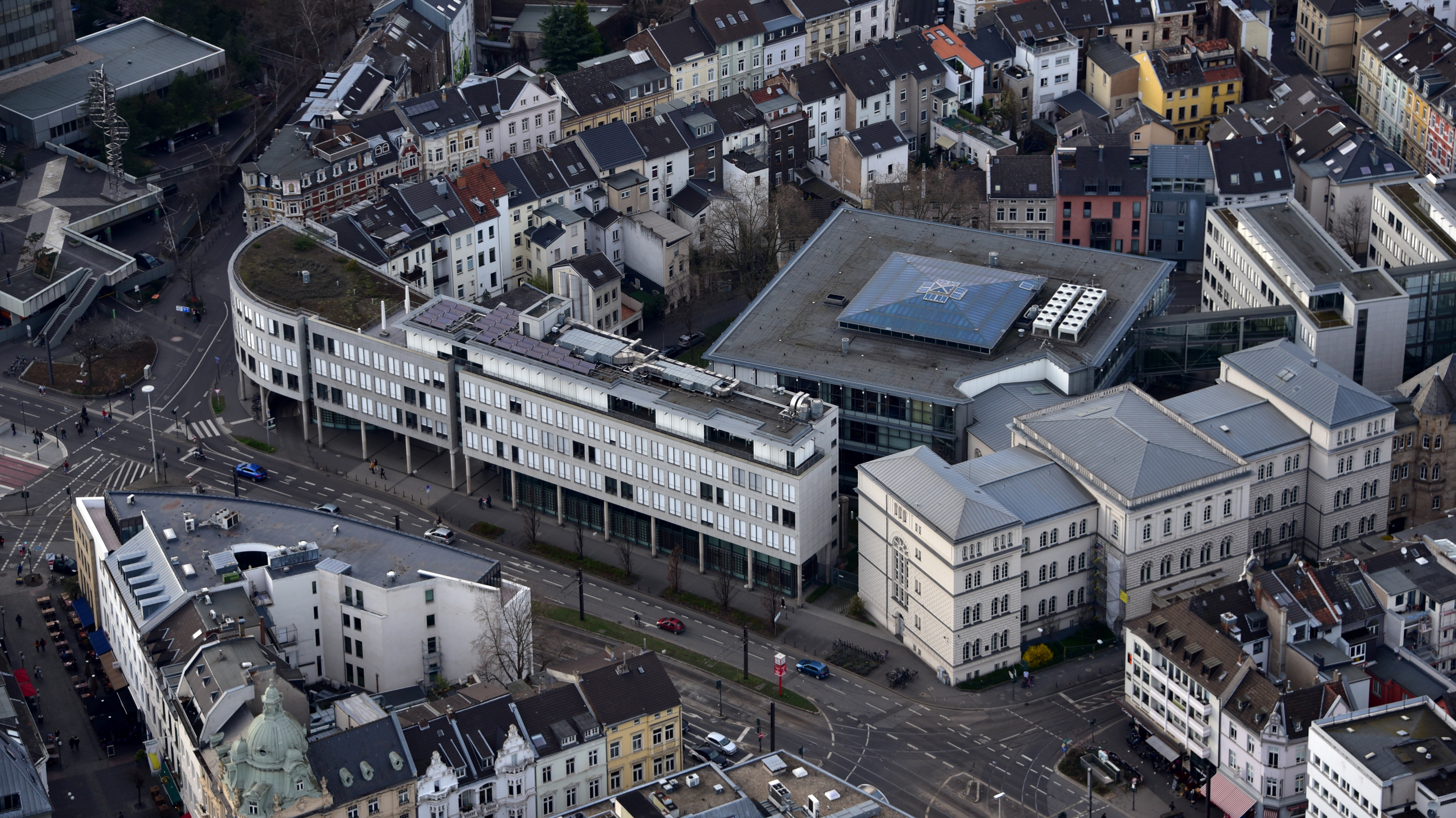 Bonner Landgericht, Luftaufnahme (2017)